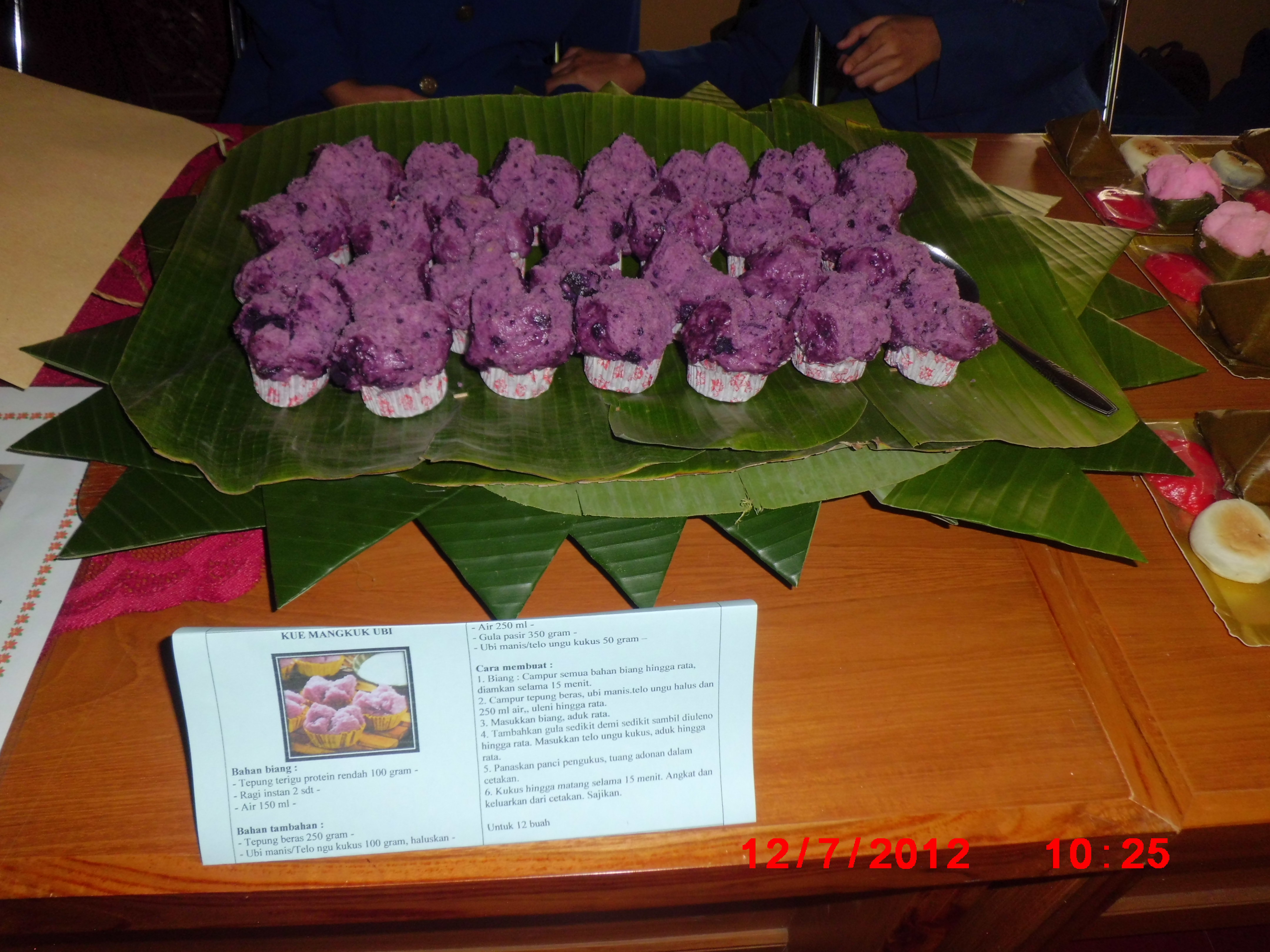 Kue mangkuk ubi adalah salah satu makanan tradisional khas Indonesia